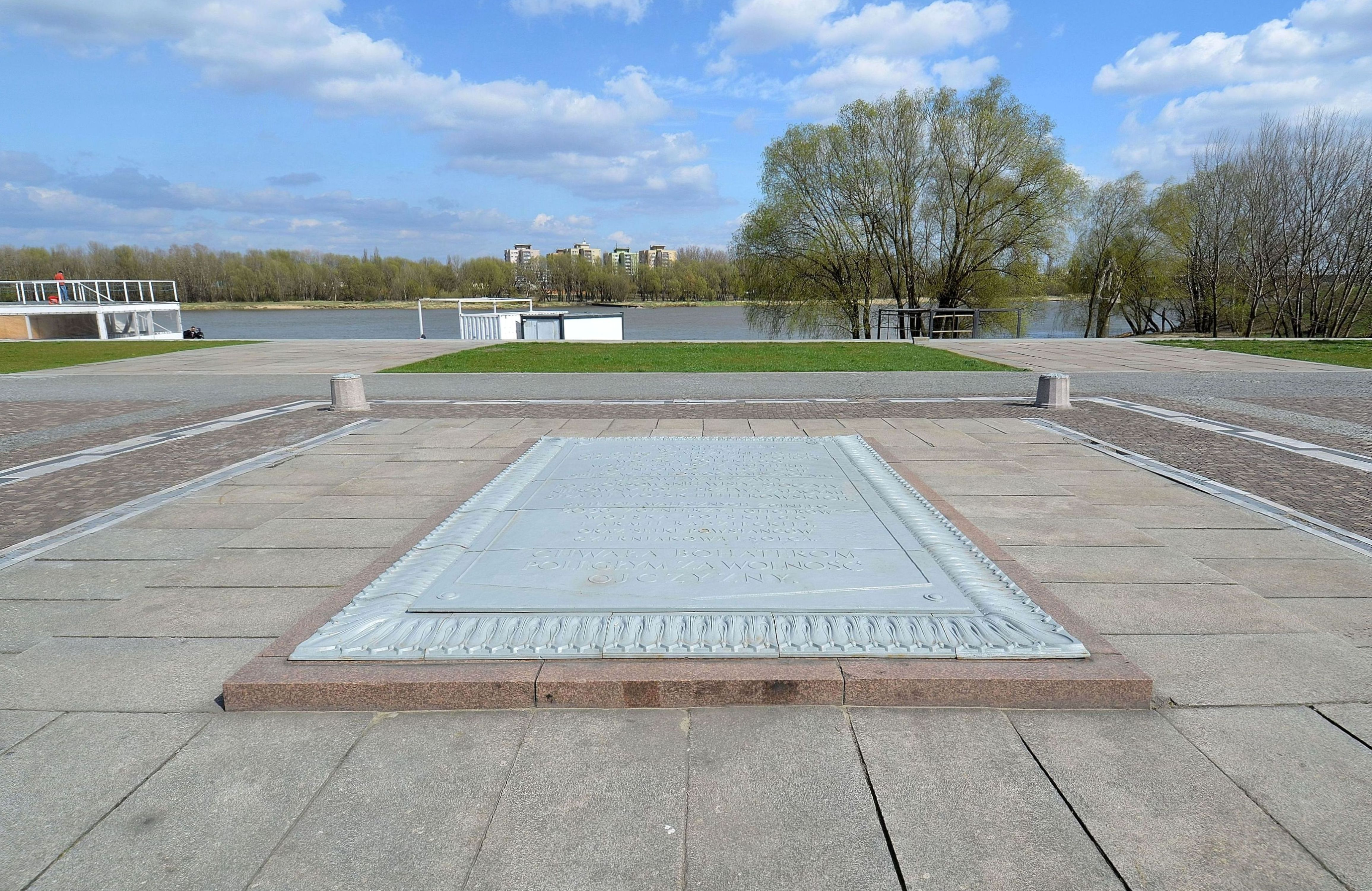 Płyta Desantu Czerniakowskiego w Warszawie